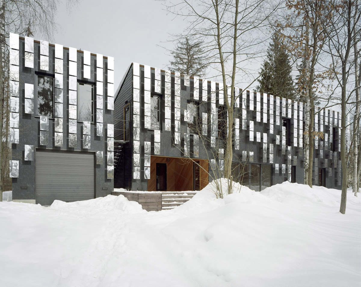 ЗЕРКАЛО МОНГАЙТ